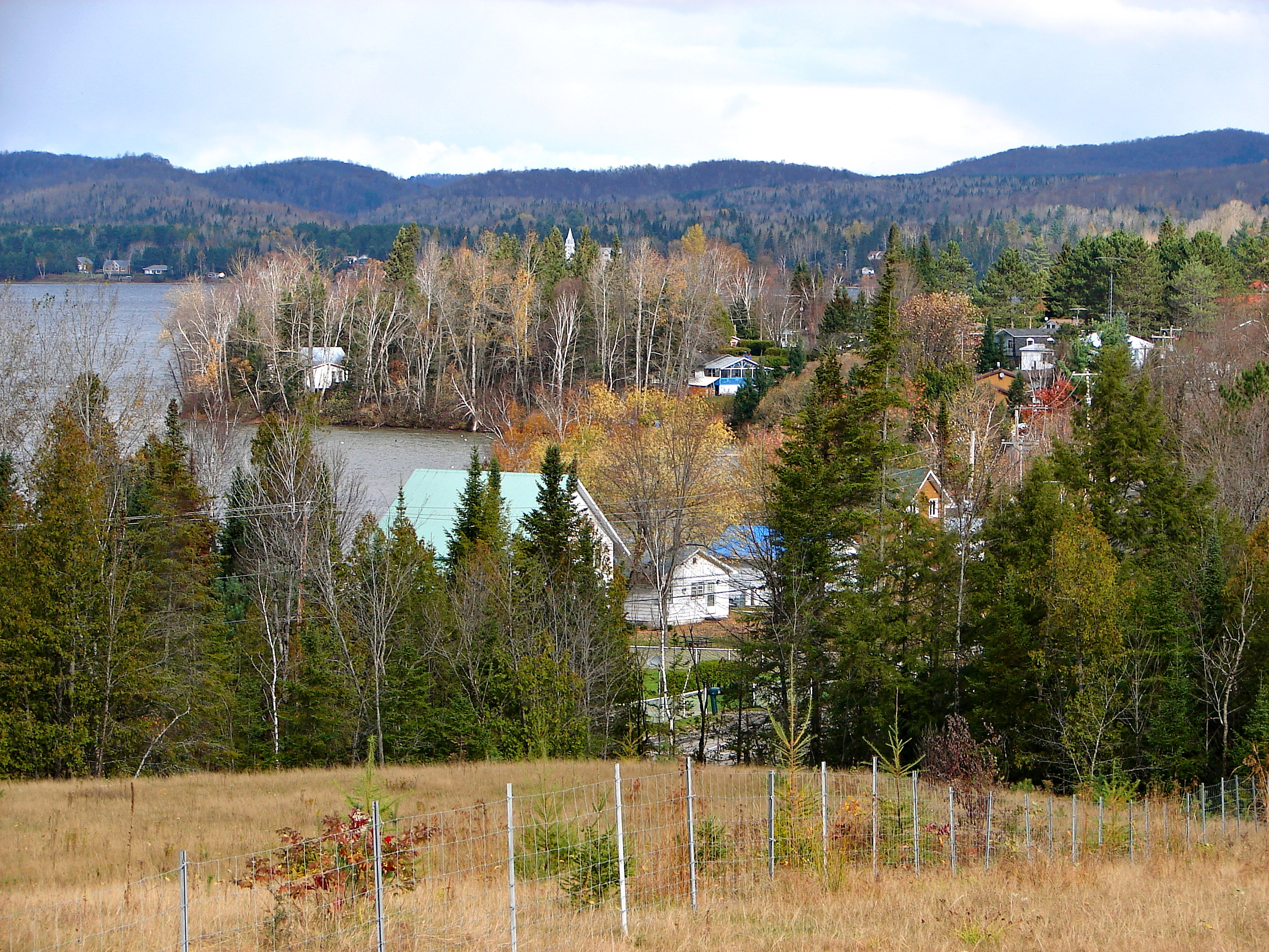 Lac-des-Plages, Quebec, Canada